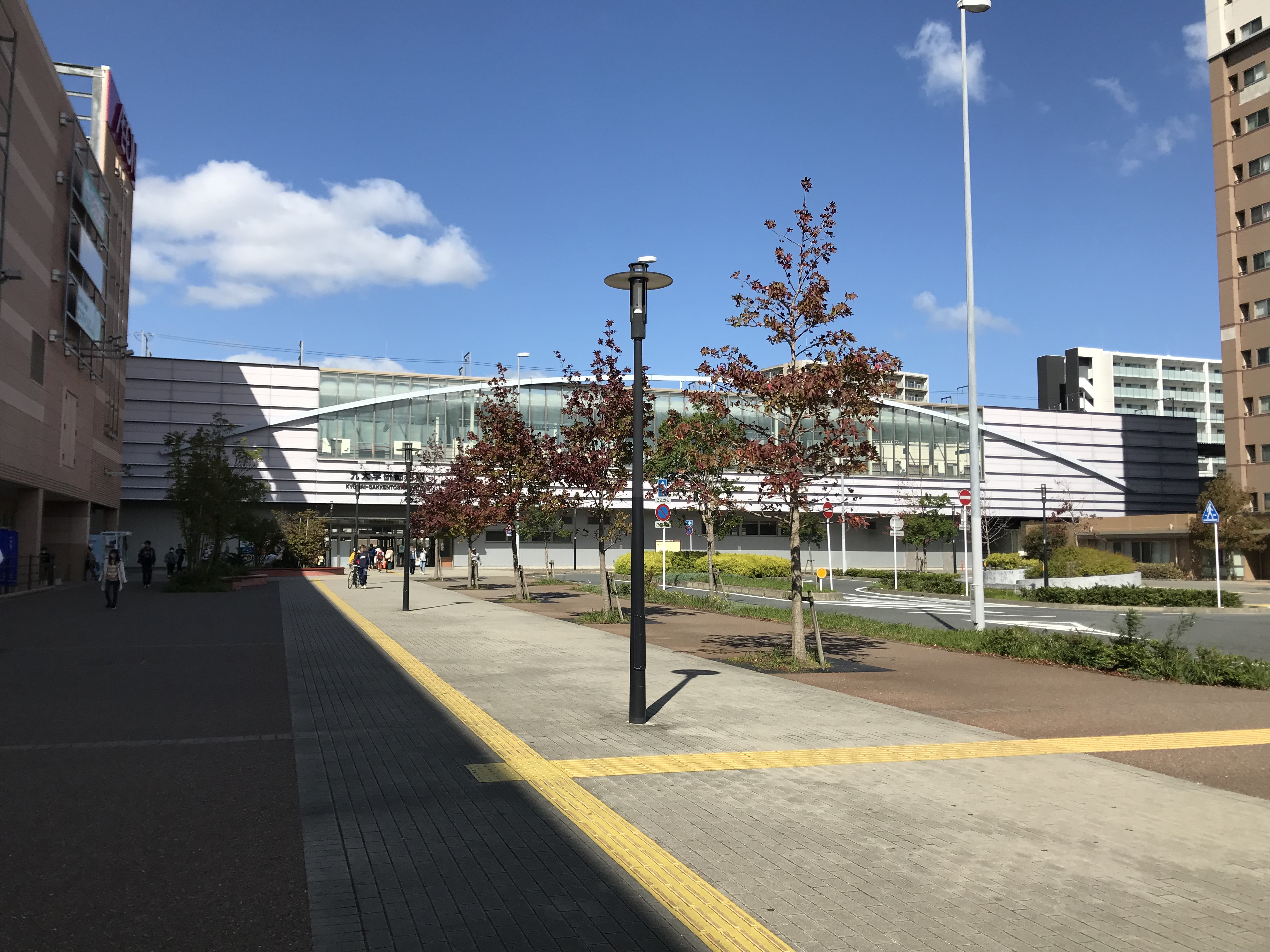 九大学研都市駅の駅舎